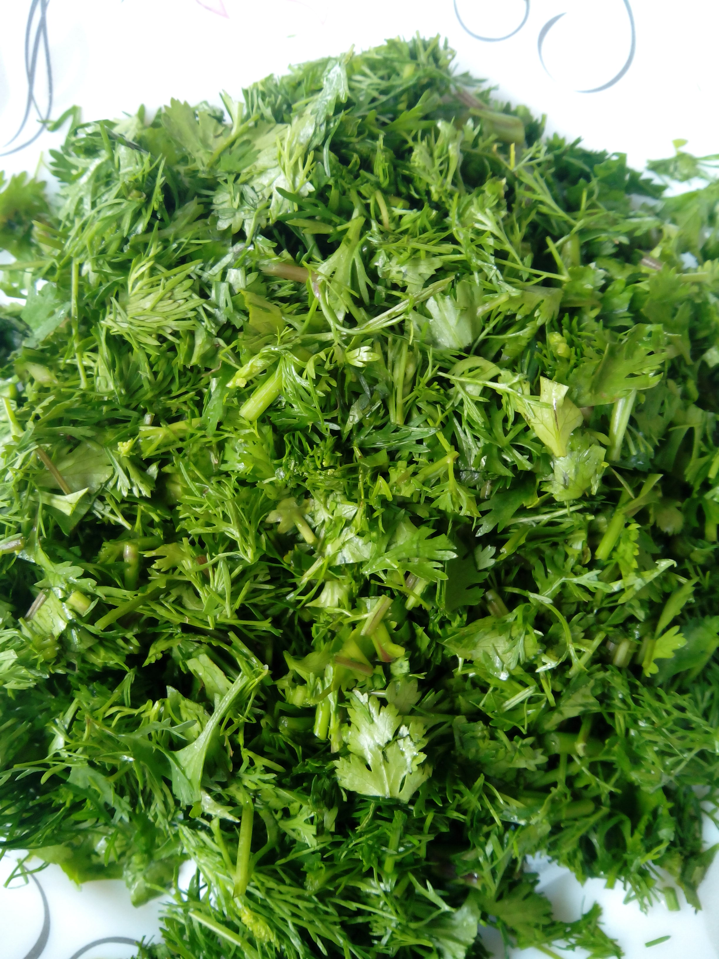 ধনেপাতা বা ধনিয়া পাতা, যা শাক হিসাবে রান্না বা সালাদ করে খাওয়া হয়